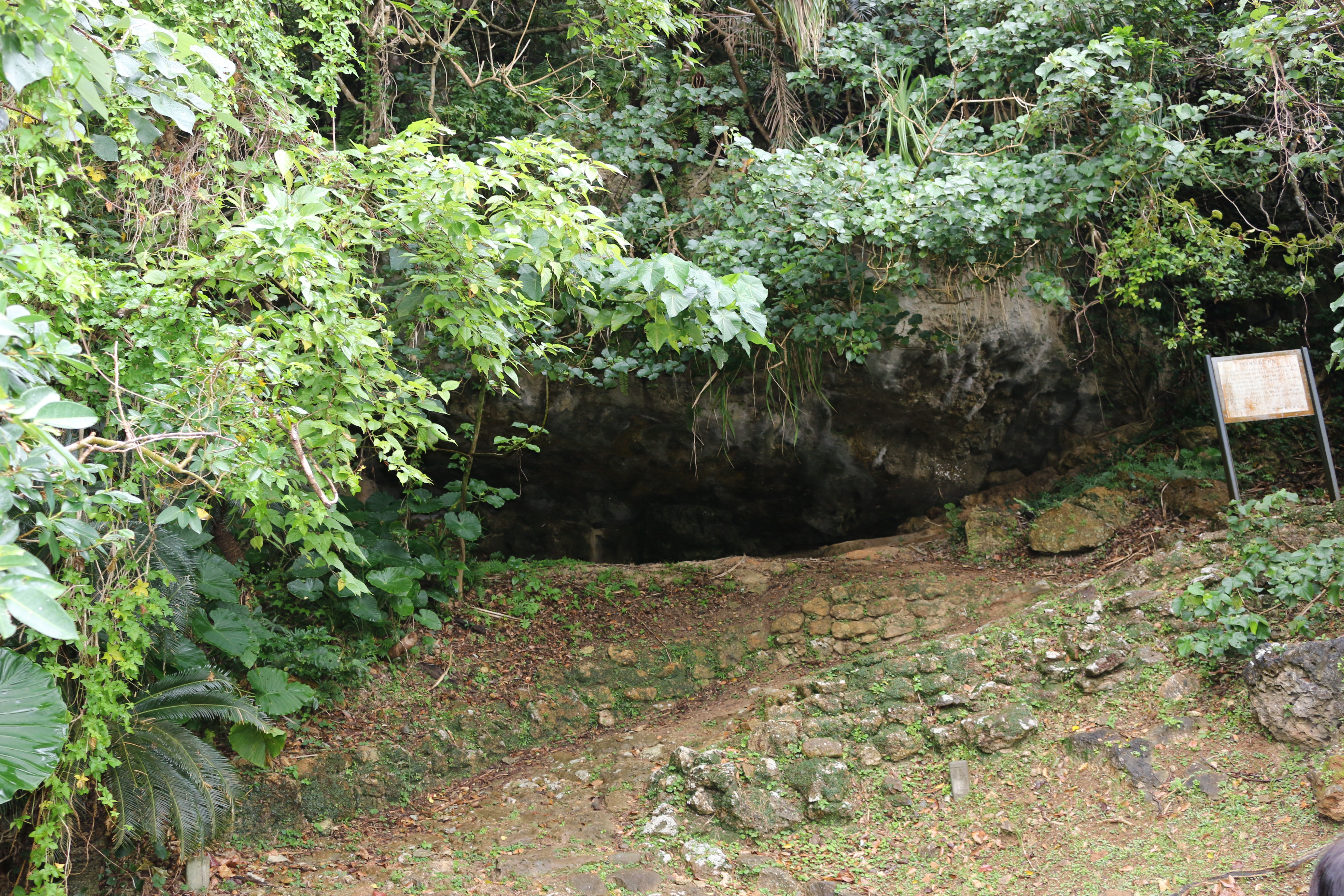 2019年2月4日撮影